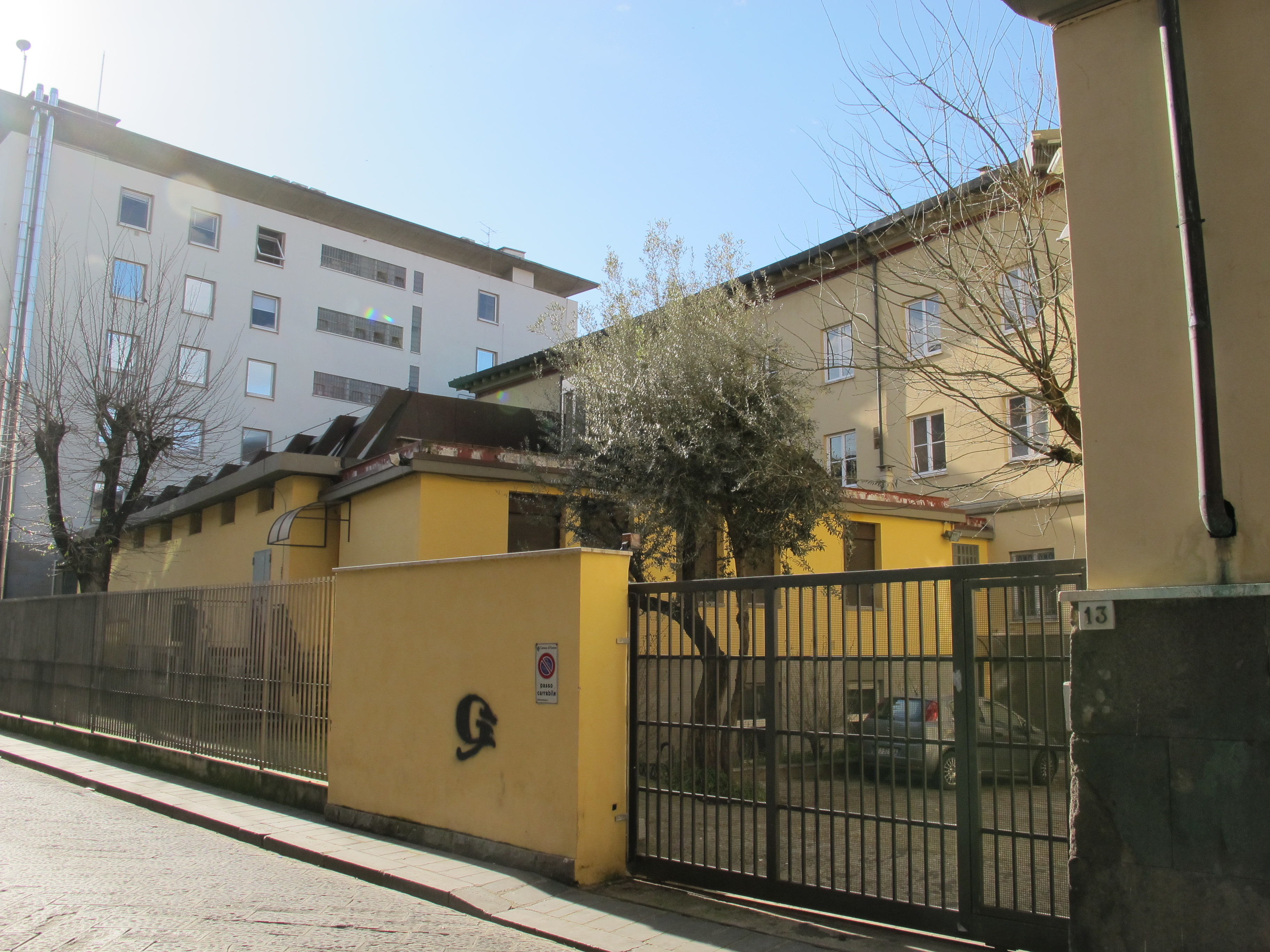 Via dell'ulivo